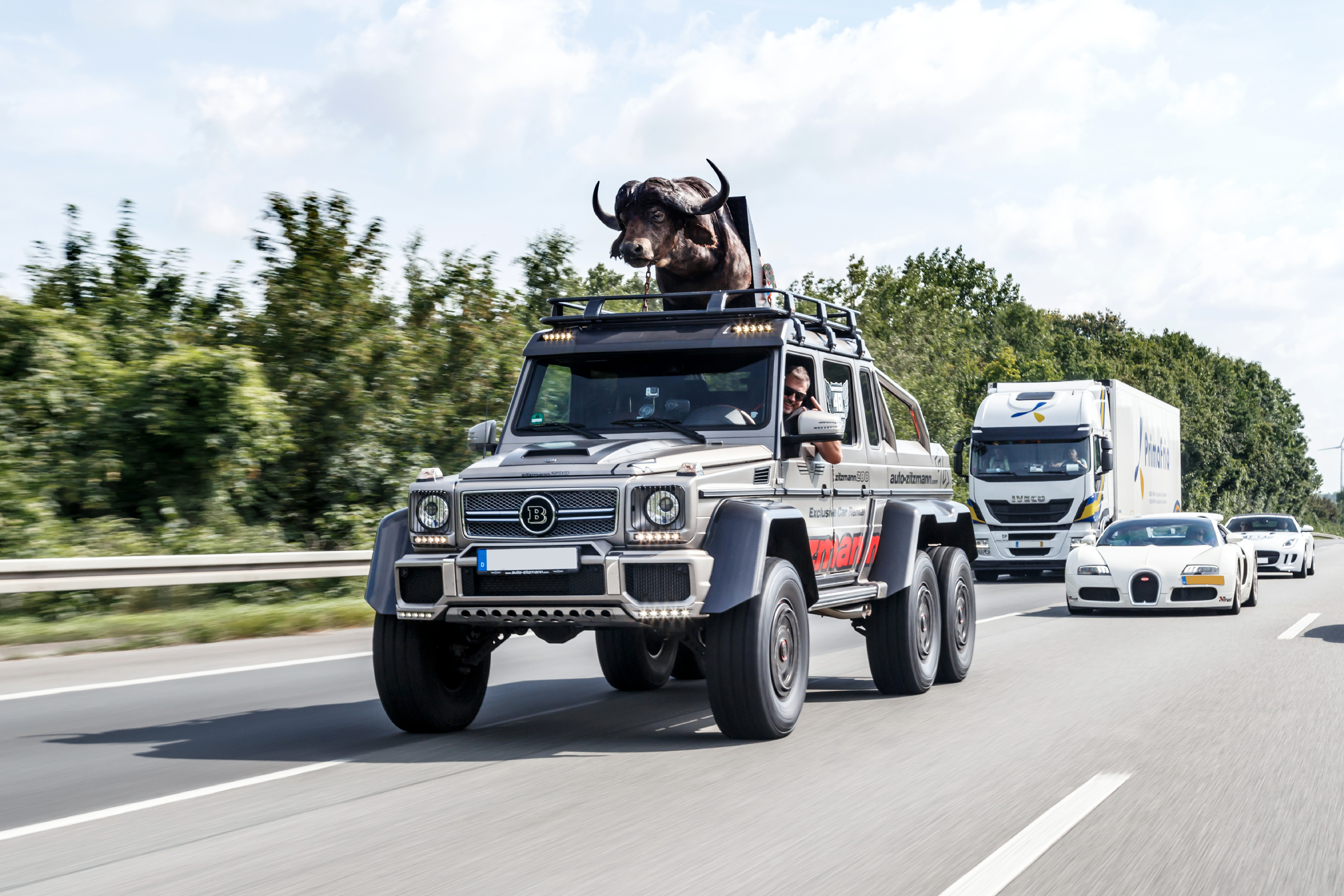 Brabus G63 AMG 6x6 (links), Bugatti Veyron 16.4 Grand Sport (mitte), sowie Jaguar F-Type (hinten) bei der Germanys Supercars Rallye (2016)